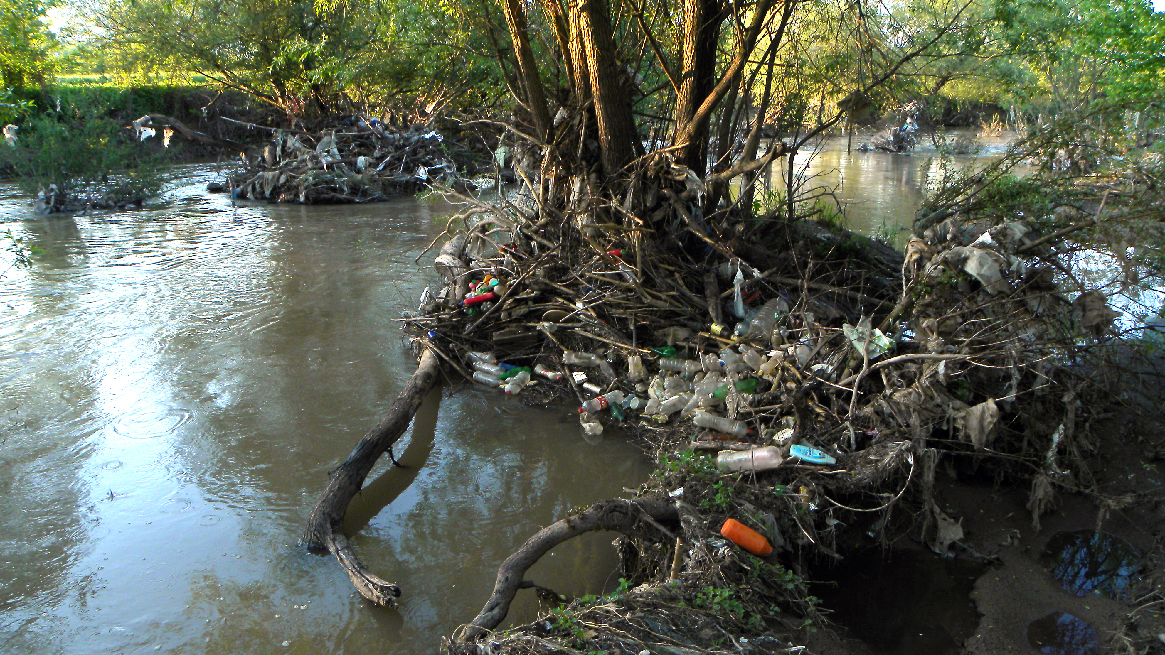 Смеће на Јужној Морави, снимљено 9. маја 2010. у близини Златокопа и Ћуковца код Врања. Ја, Moravac (разговор), аутор сам ове фотографије и предајем је у јавно власништво.